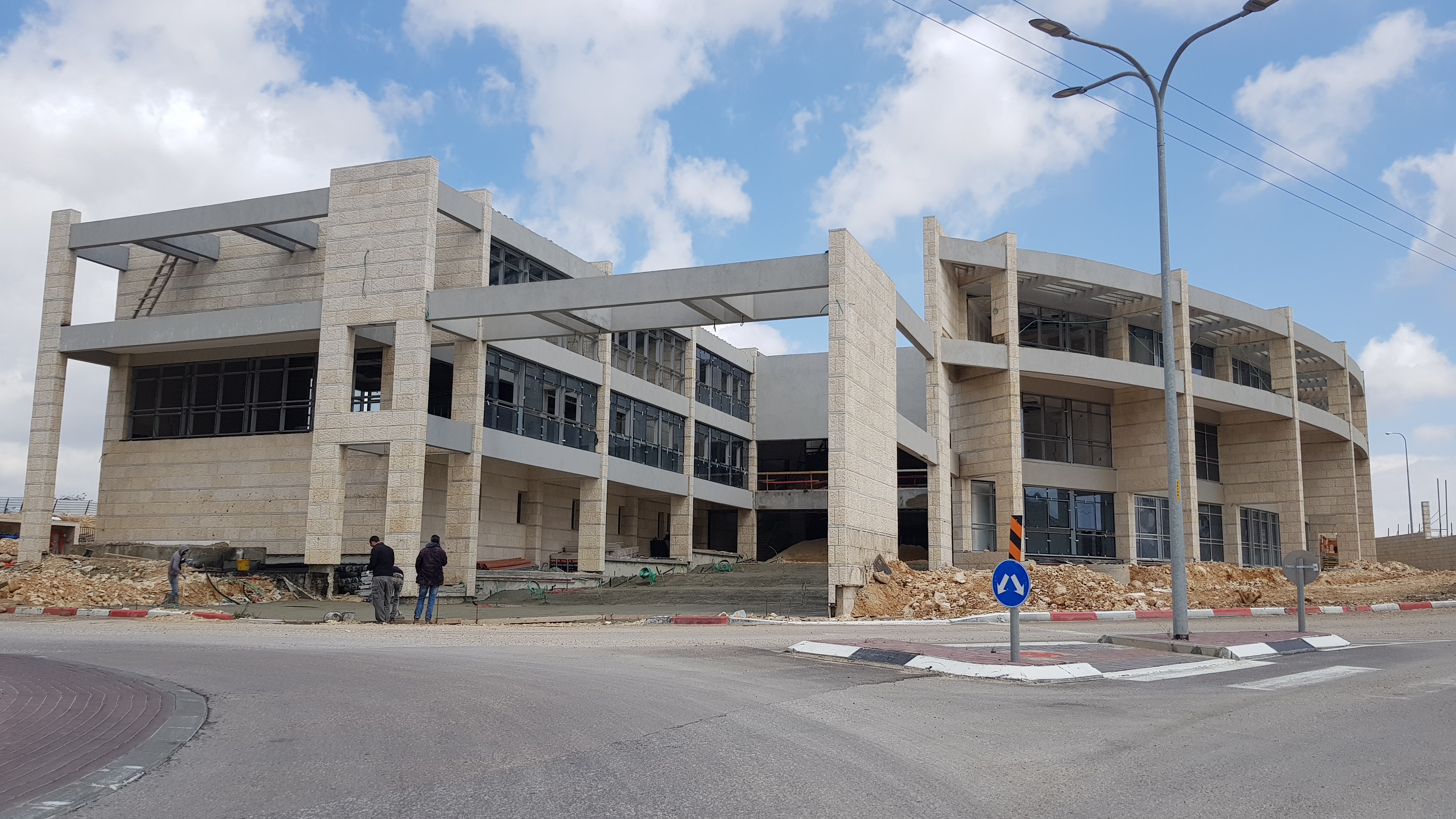 מבנה המועצה החדש בשער בנימין בבניה (מרץ 2019)